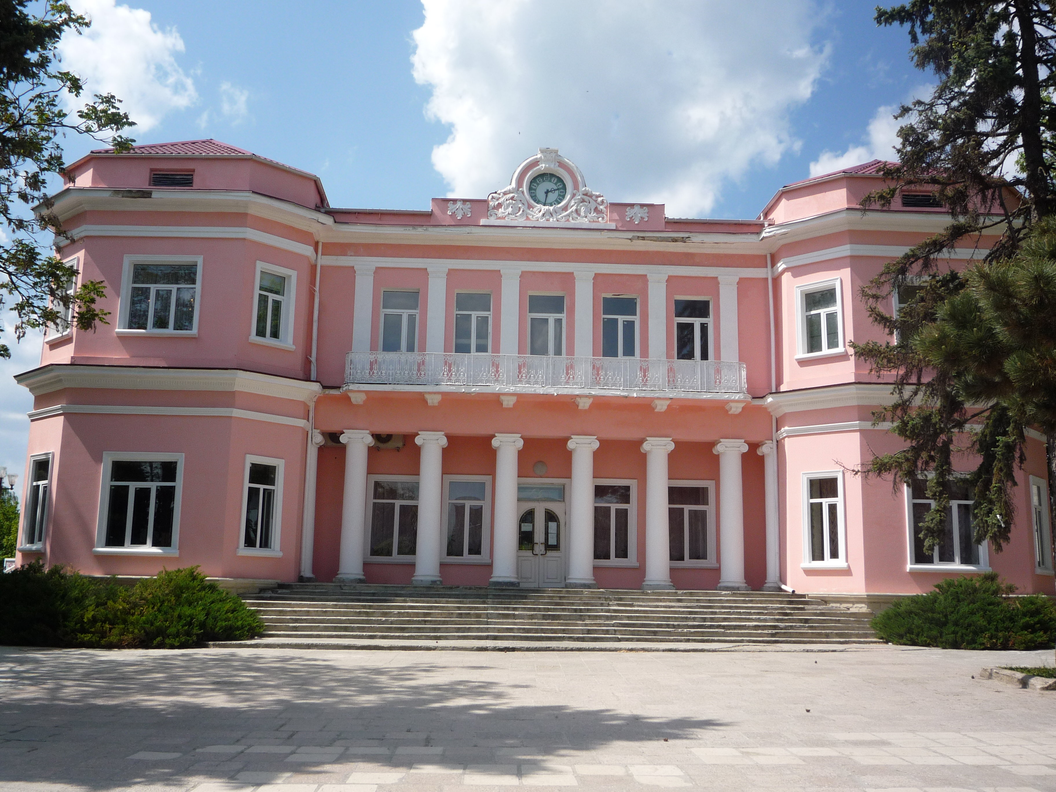 Oficiul Stării Civile din Bălţi.